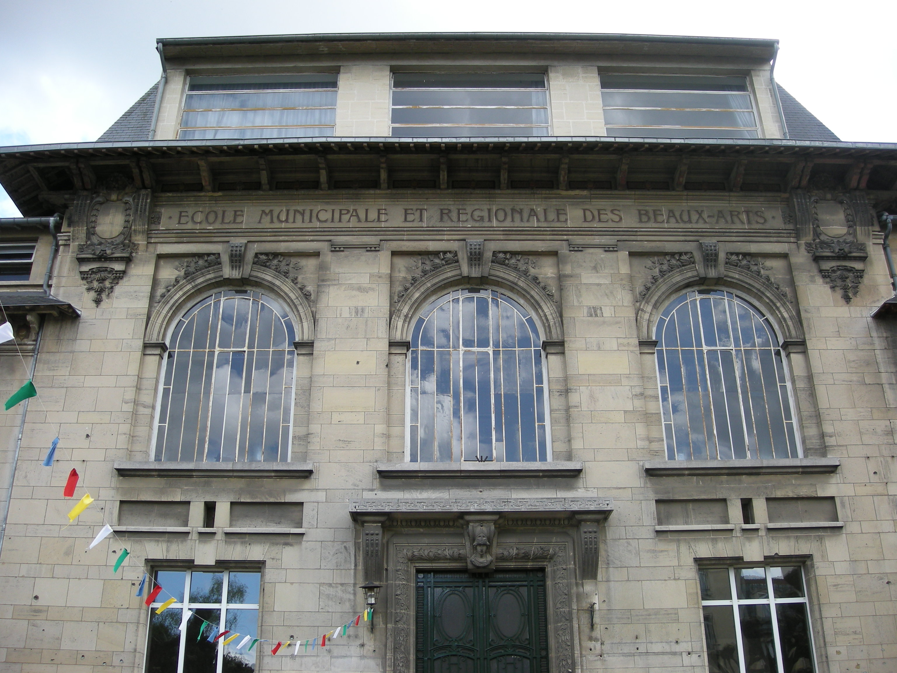 École nationale supérieure d'art de Nancy (ex Ecole des Beaux-Arts), construite en 1909